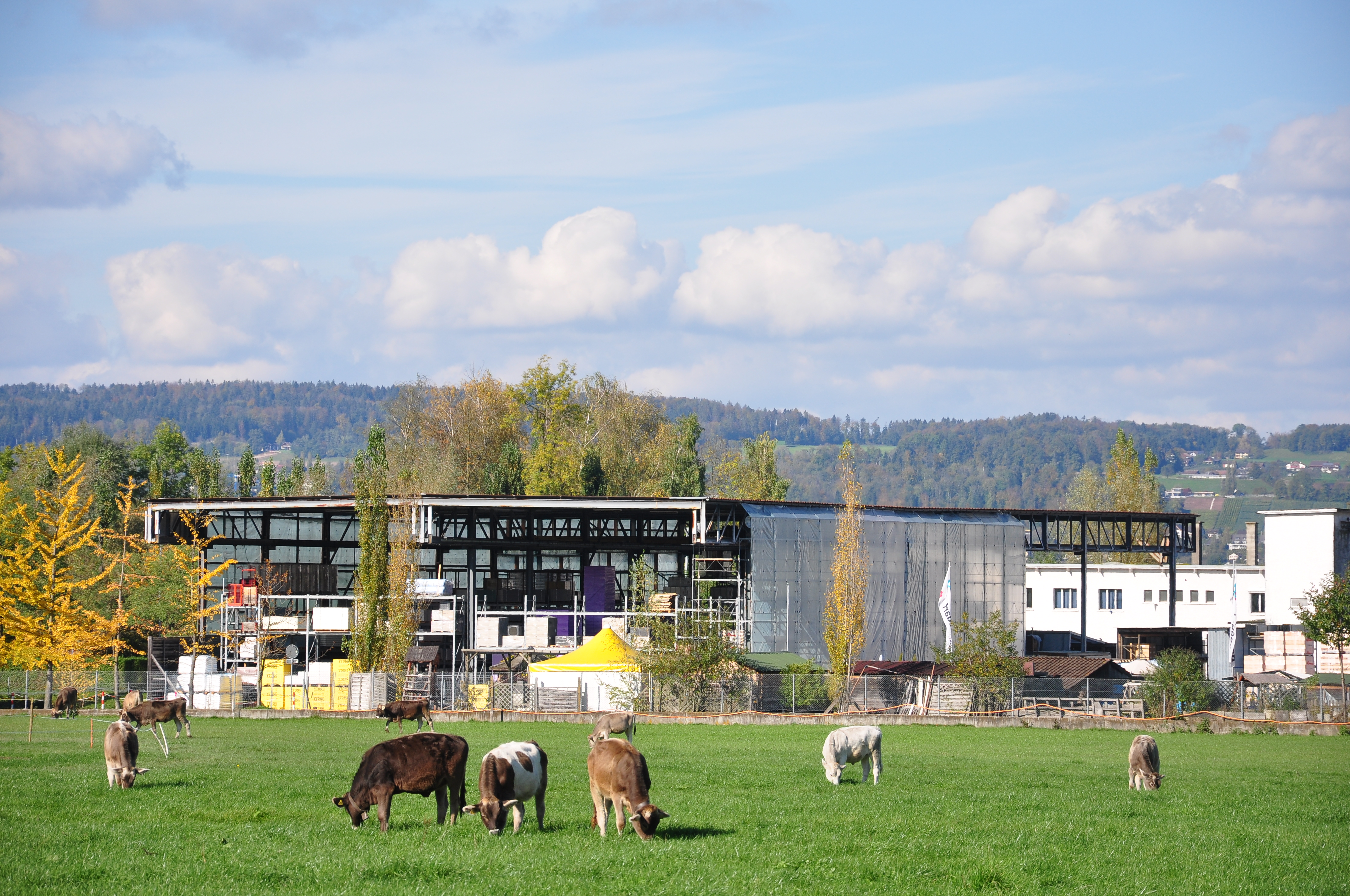 Pfäffikon (SZ)